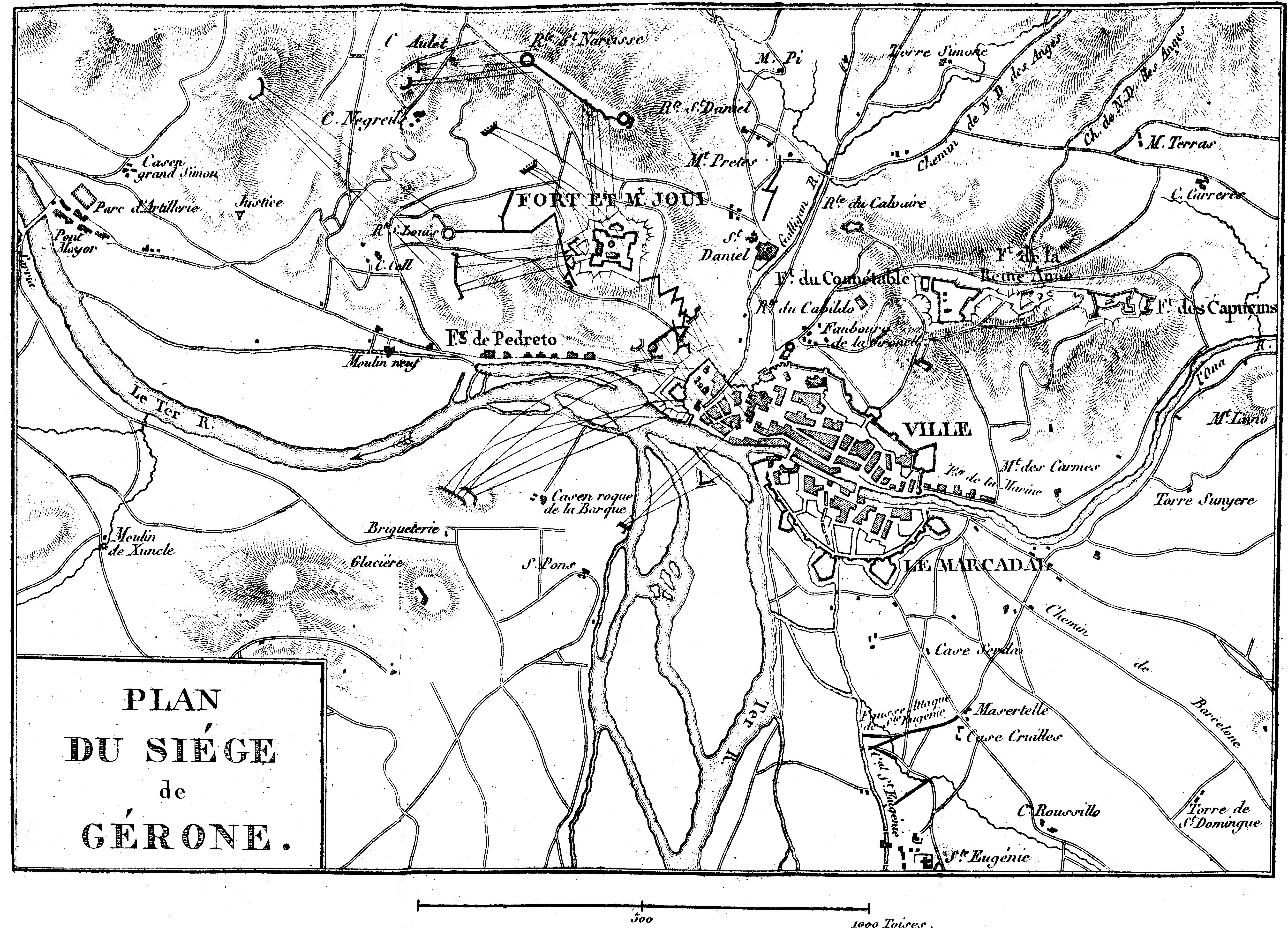 Tome 10, Victoires conquêtes désastres revers et guerres civiles des français de 1789 à 1815, carte du siège de Gérone.